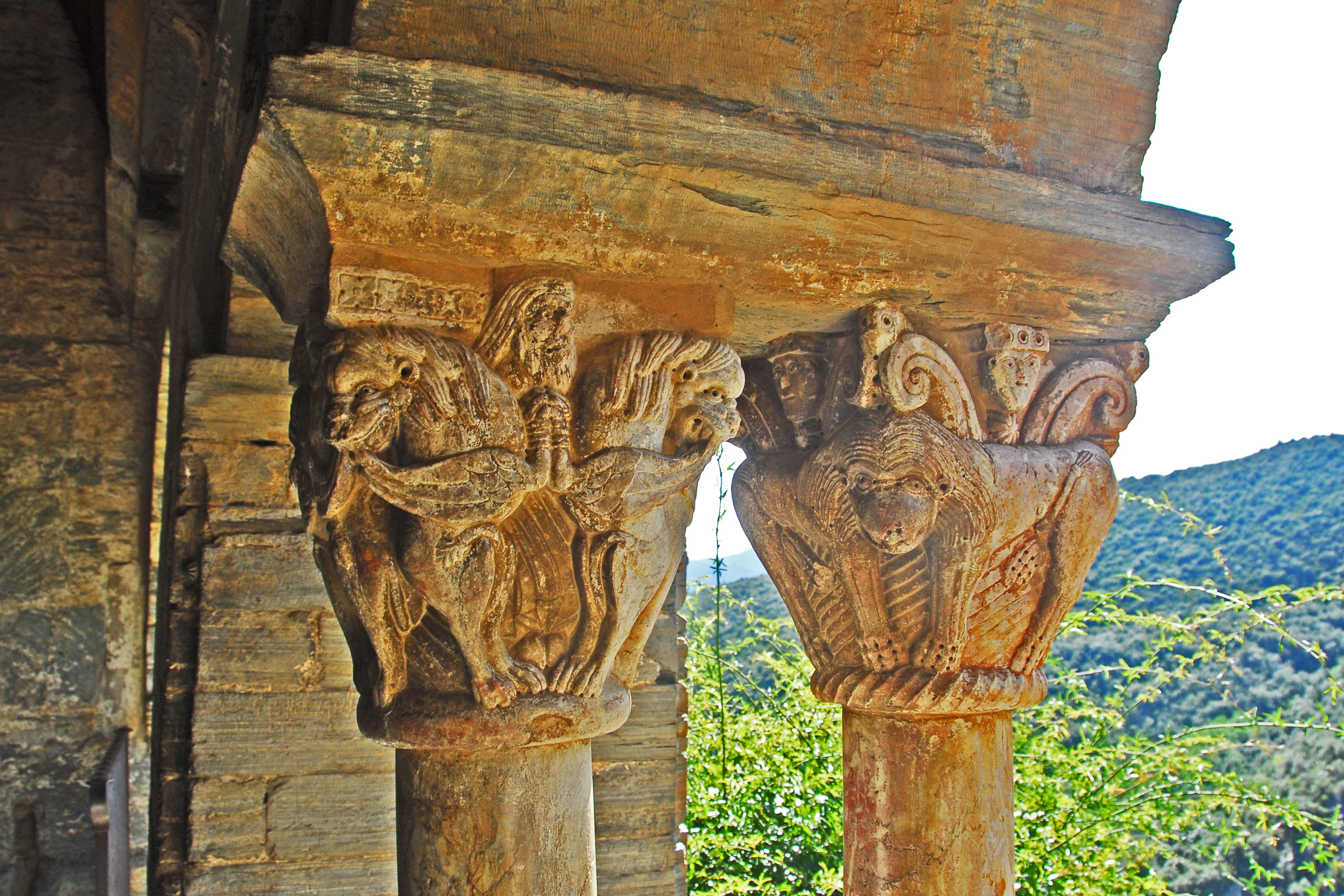 Serrabone, Kreuzgang, Kapitell Nr. 7+8